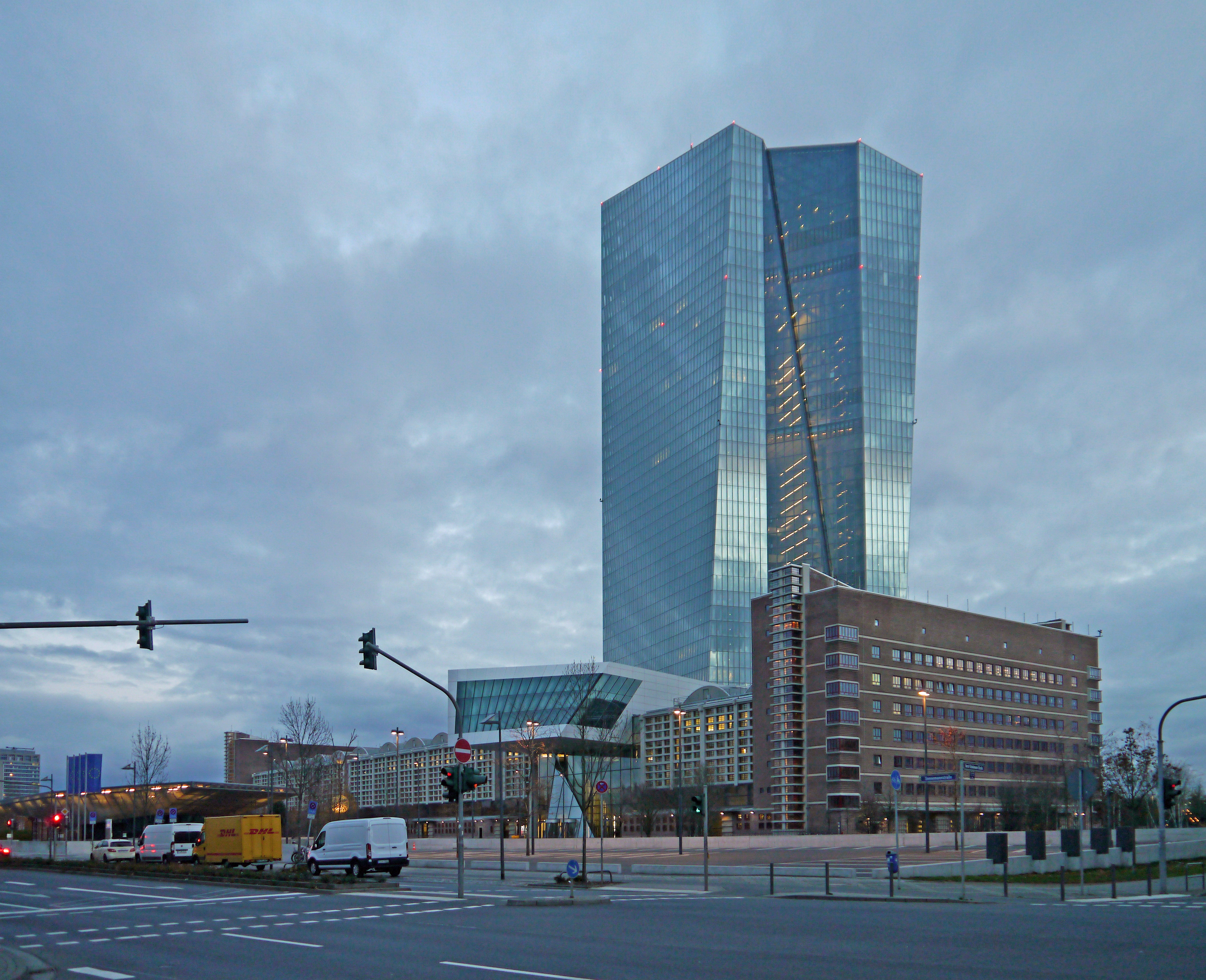 Die Zentrale der EZB (2016) Haupteingang in der Sonnemannstrasse in Frankfurt-Ostend.